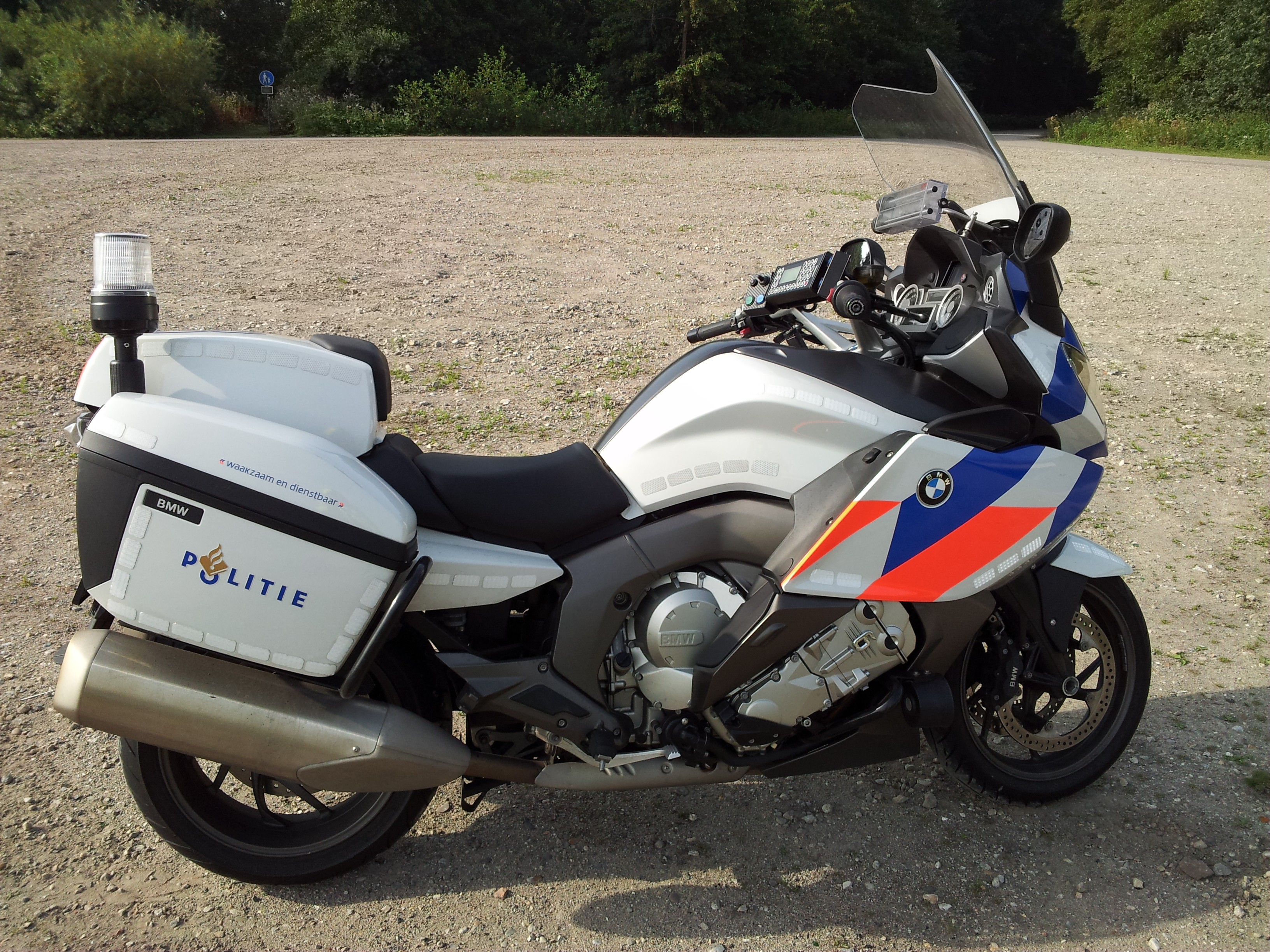 BMW